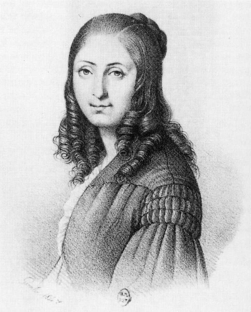 Portrait de Flora Tristan Lithographie